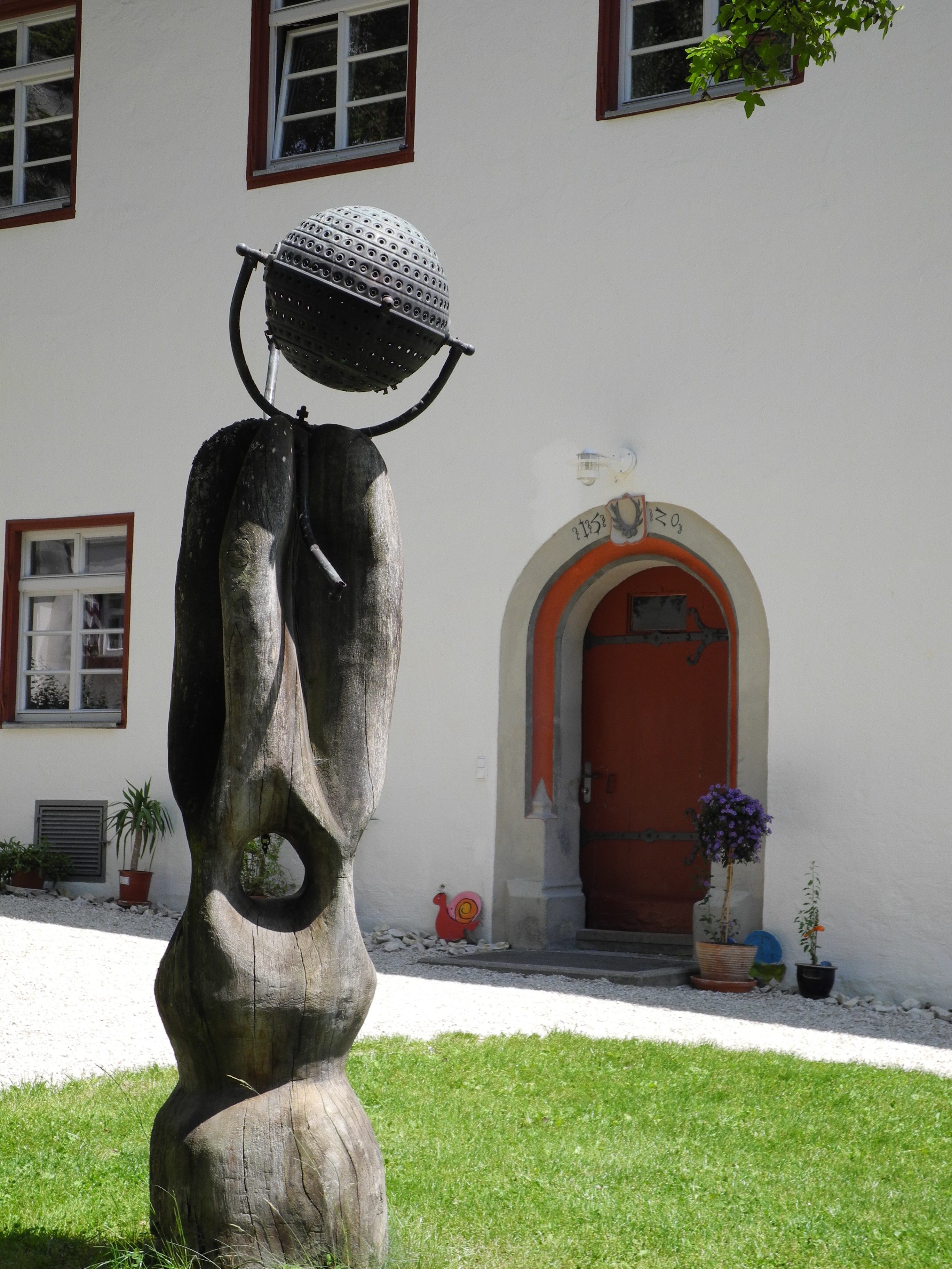 Schelklingen - Ehemal. Kloster Urspring